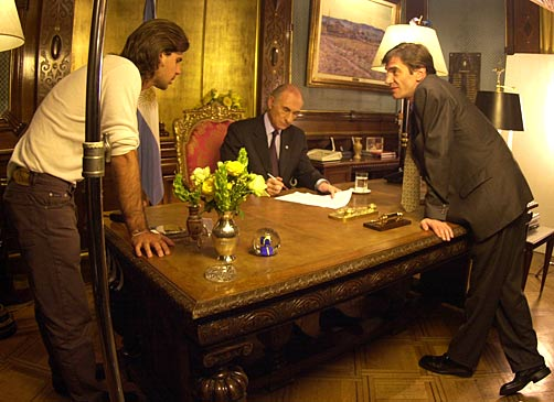 El Presidente Fernando de la Rúa prepara su discurso frente a la renuncia del Vicepresidente Carlos Álvarez, junto a su hijo Antonio y a Darío Lopérfido.